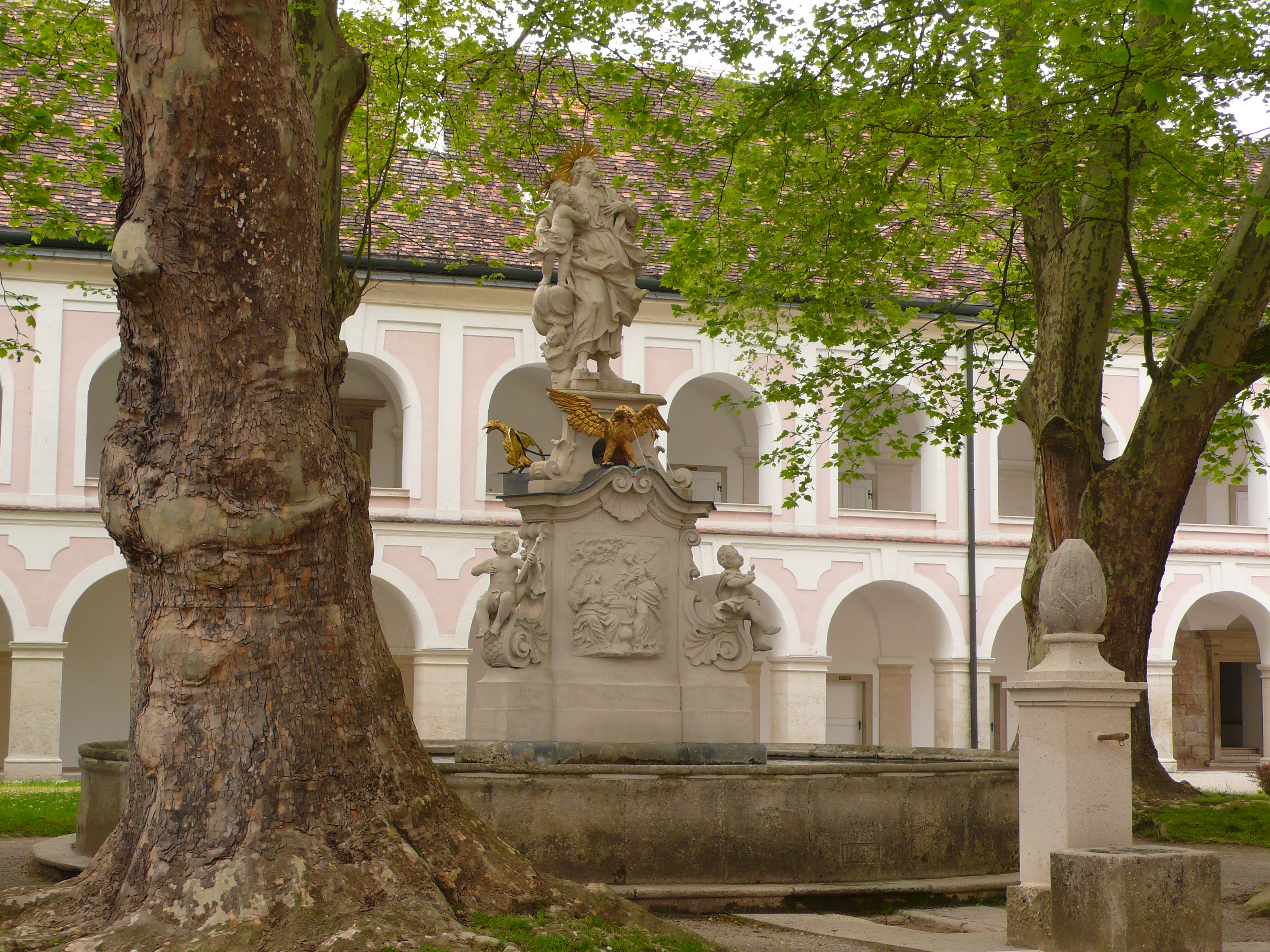 Stift Heiligenkreuz, Niederösterreich; Josephsbrunnen